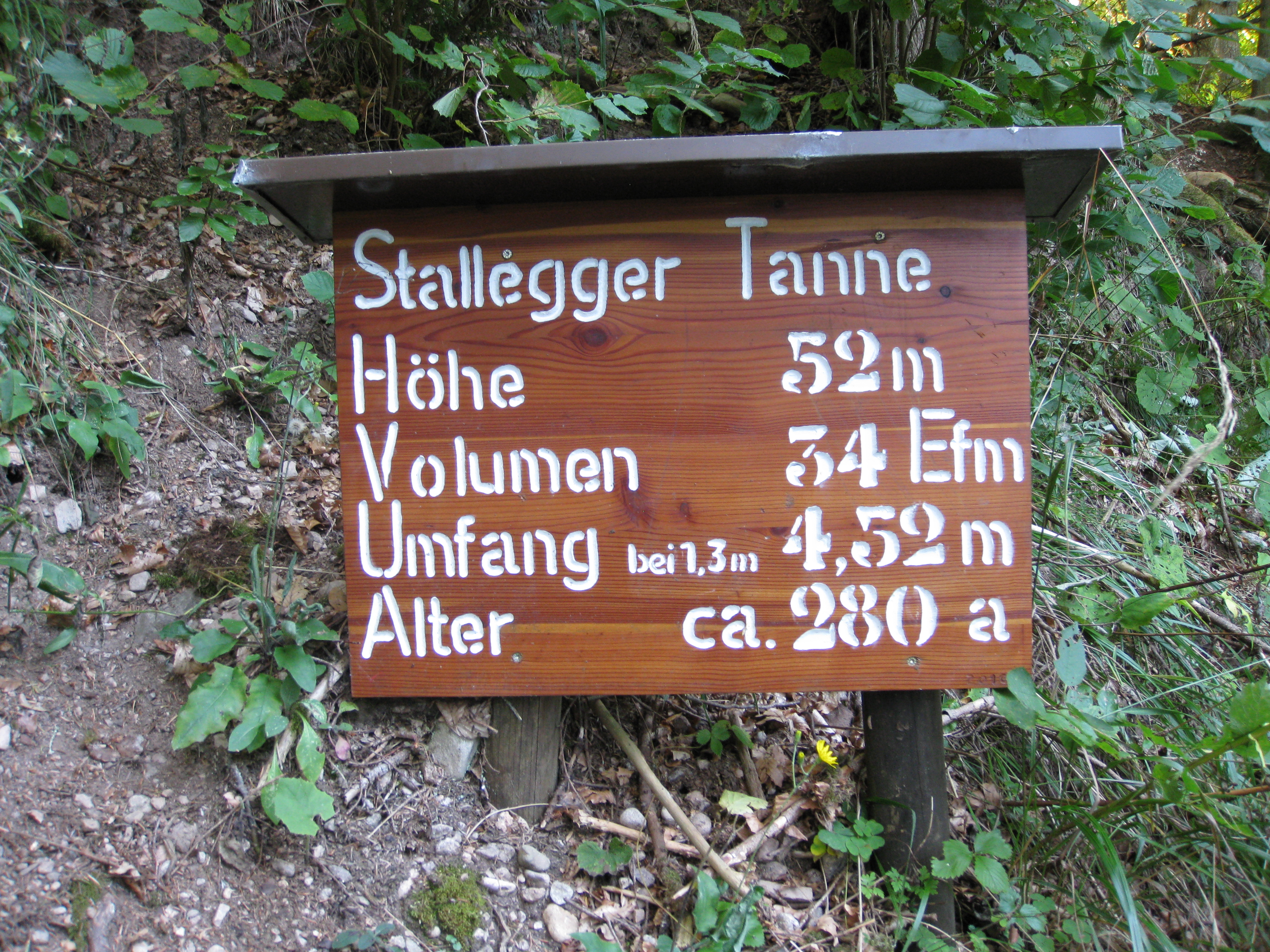 Infotafel Stallegger Tanne